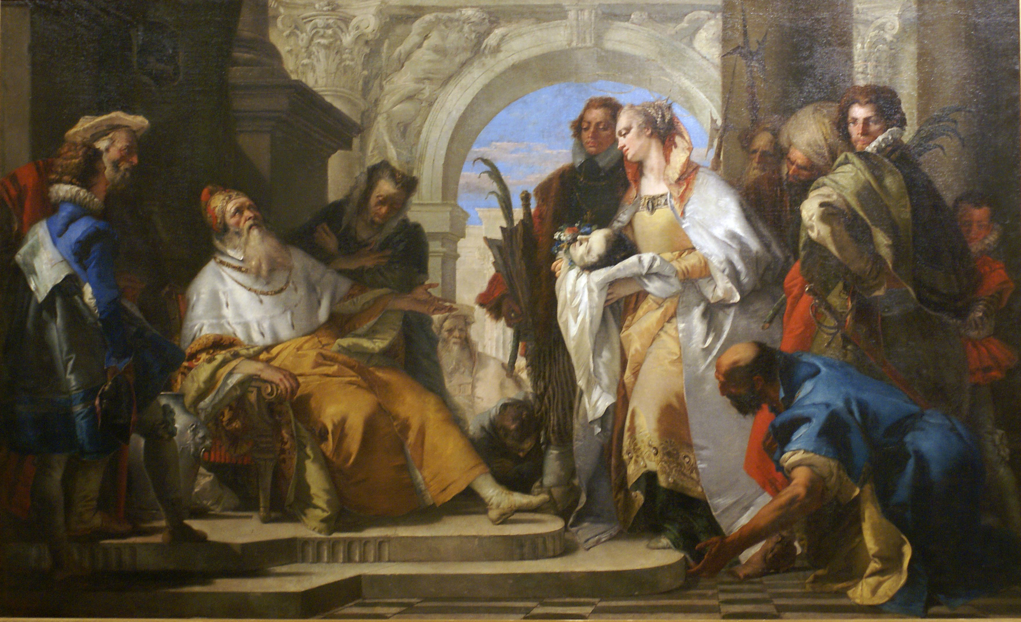 Die Heiligen der Familie Crotta